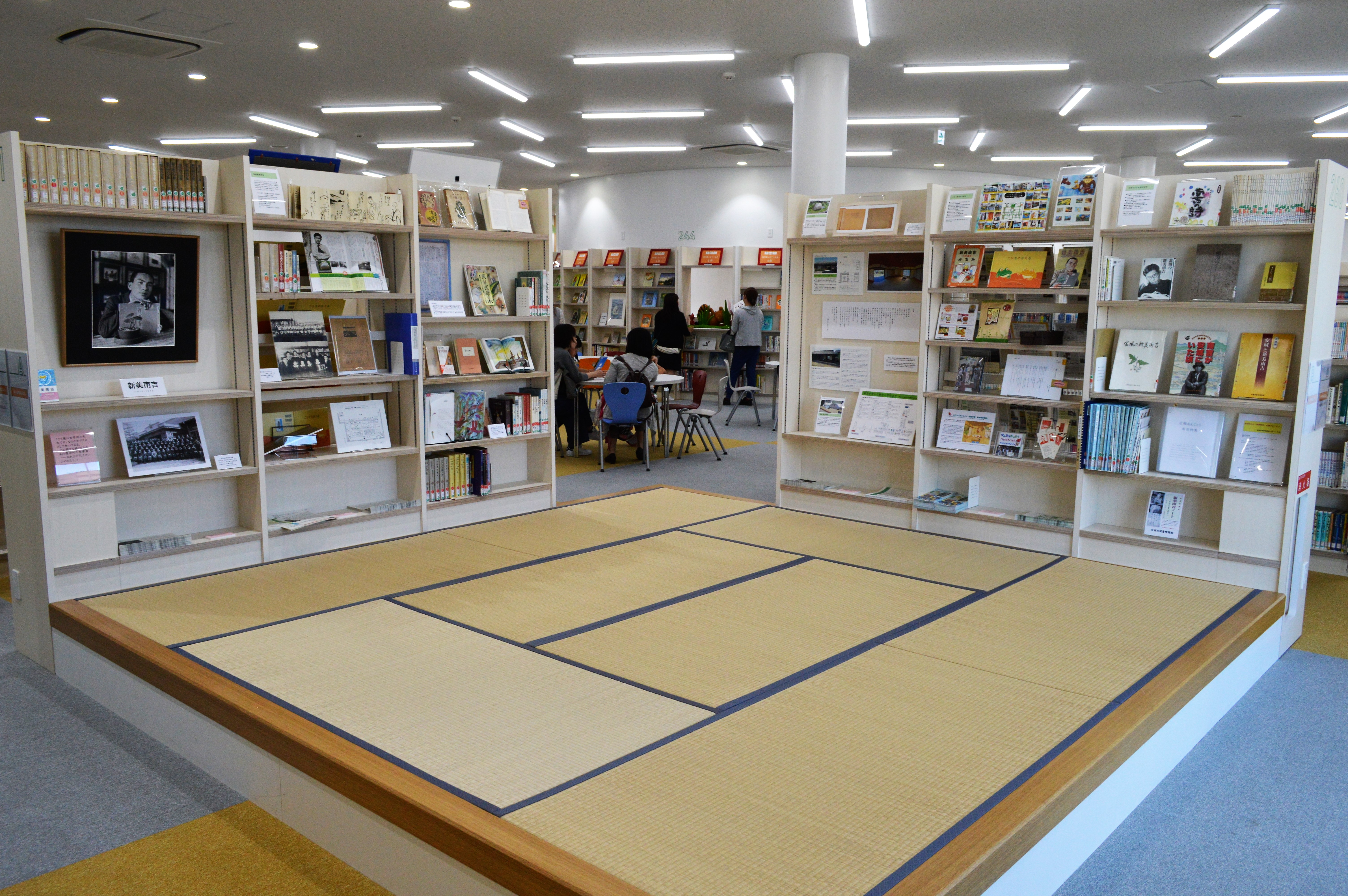 安城市図書情報館。3階のなんきちさんのへや。郷土の偉人である新美南吉をイメージ。